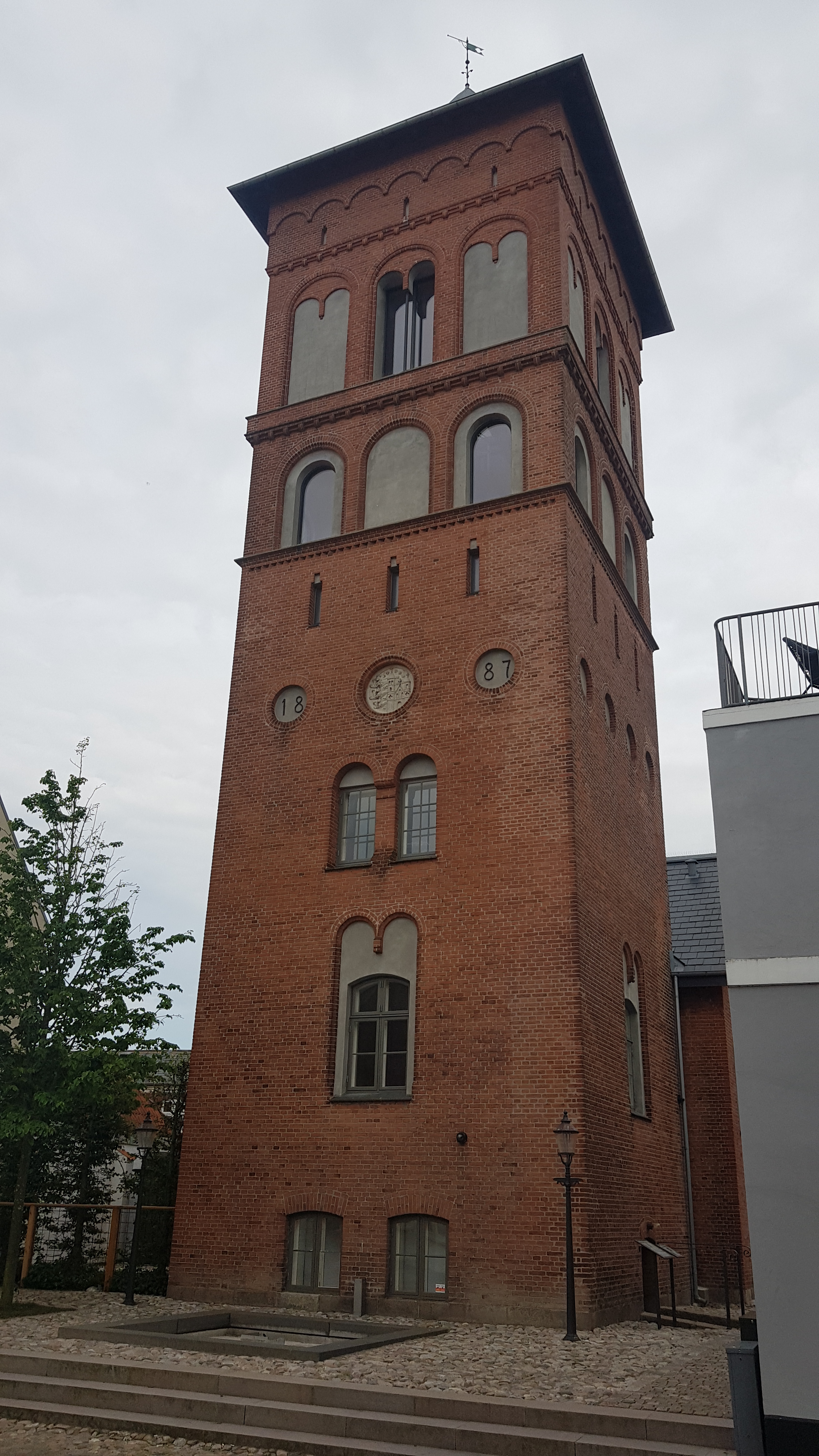 Dagmarsgades Vandtårn i Ribe